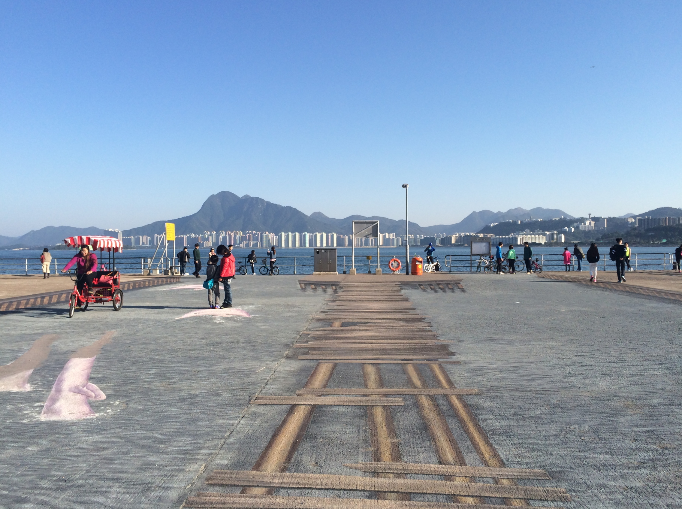 Tai Po Promenade Pier Open space